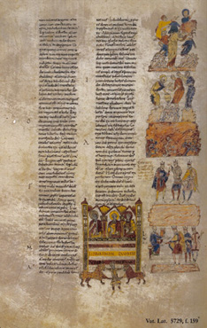 Página completa de la Biblia de Ripoll . Biblioteca Vaticana